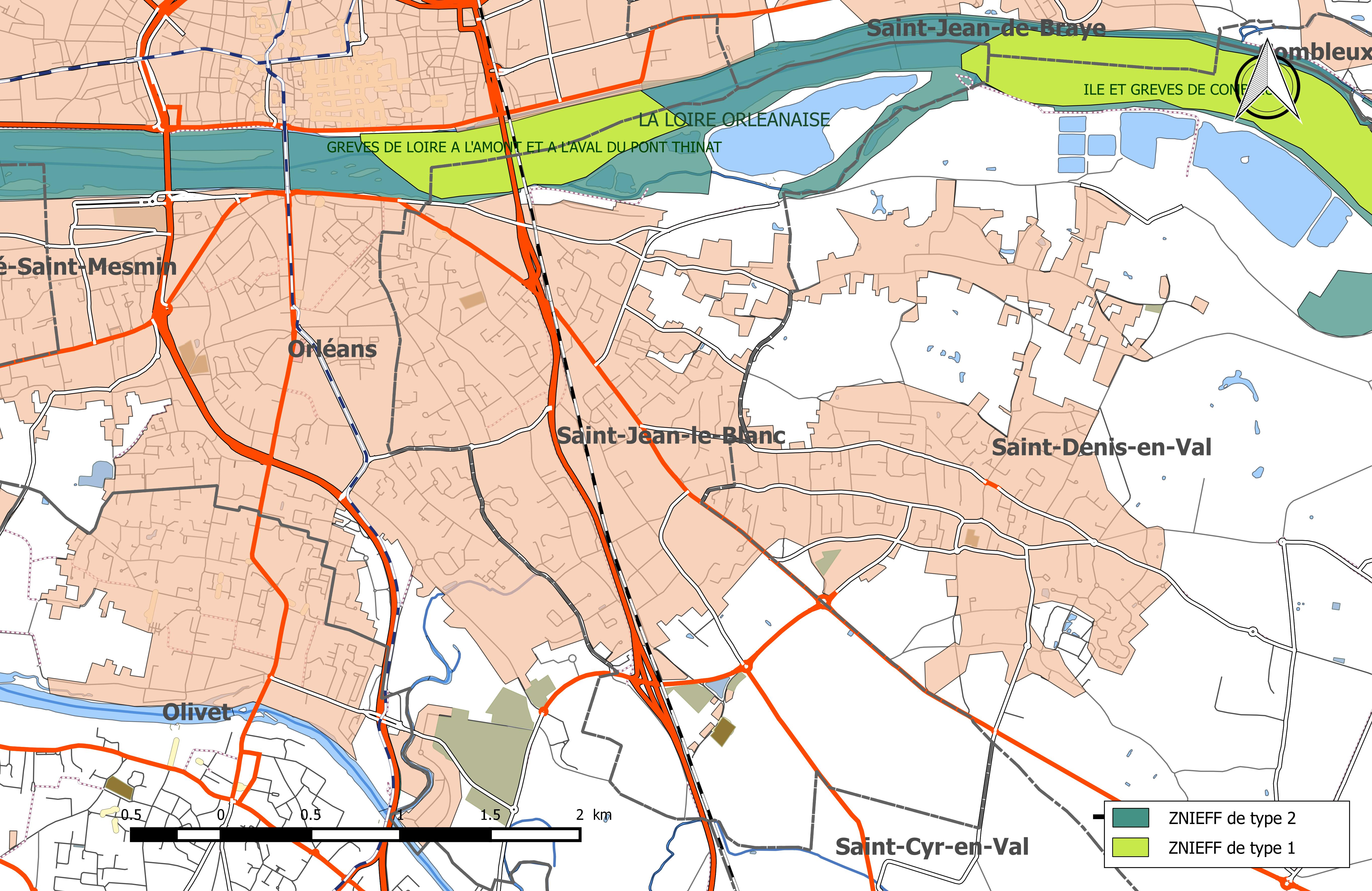 Carte des Zones naturelles d'intérêt écologique faunistique et Floristique (ZNIEFF) de la commune de Saint-Jean-le-Blanc (Loiret).